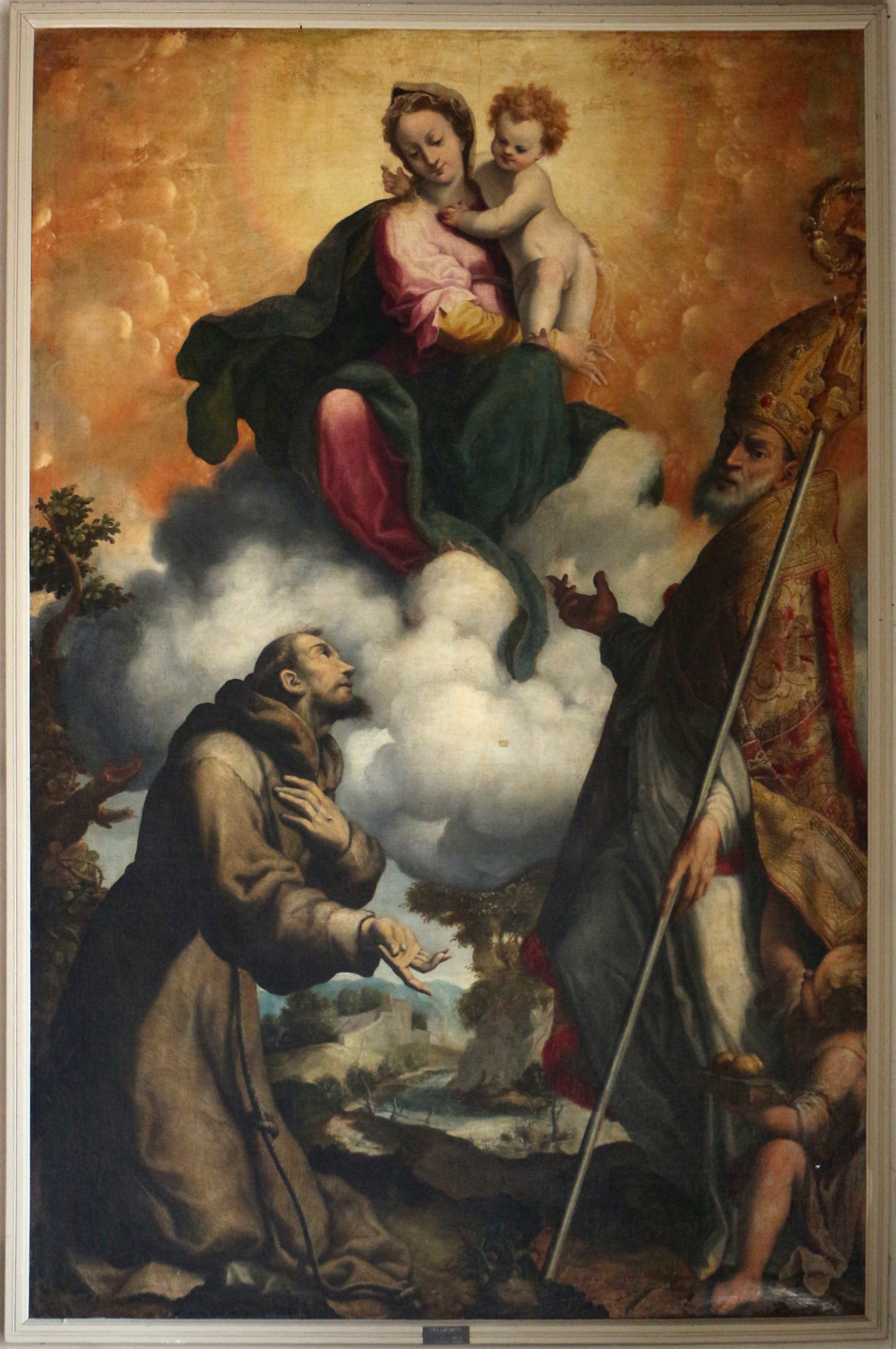 Palazzo Comunale This is a photo of a monument which is part of cultural heritage of Italy.